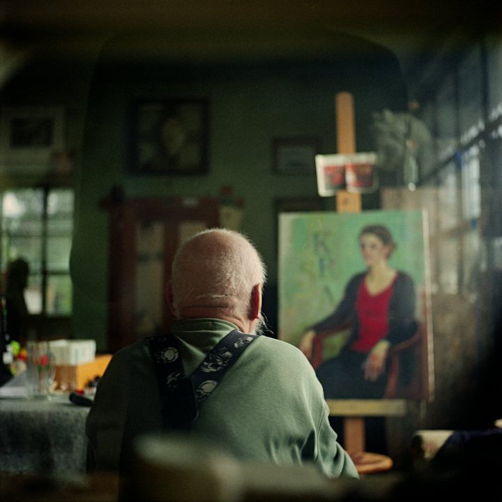 Kristýna Erbenová, fotografické dílo